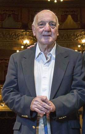 Buenos Aires, Abril 20 de 2013. El jefe de Gobierno de la Ciudad de Buenos Aires, Mauricio Macri, compartió un almuerzo en el Teatro Colón con el destacado golfista profesional Roberto De Vicenzo, quien cumplió 90 años. foto: GCBA/Prensa